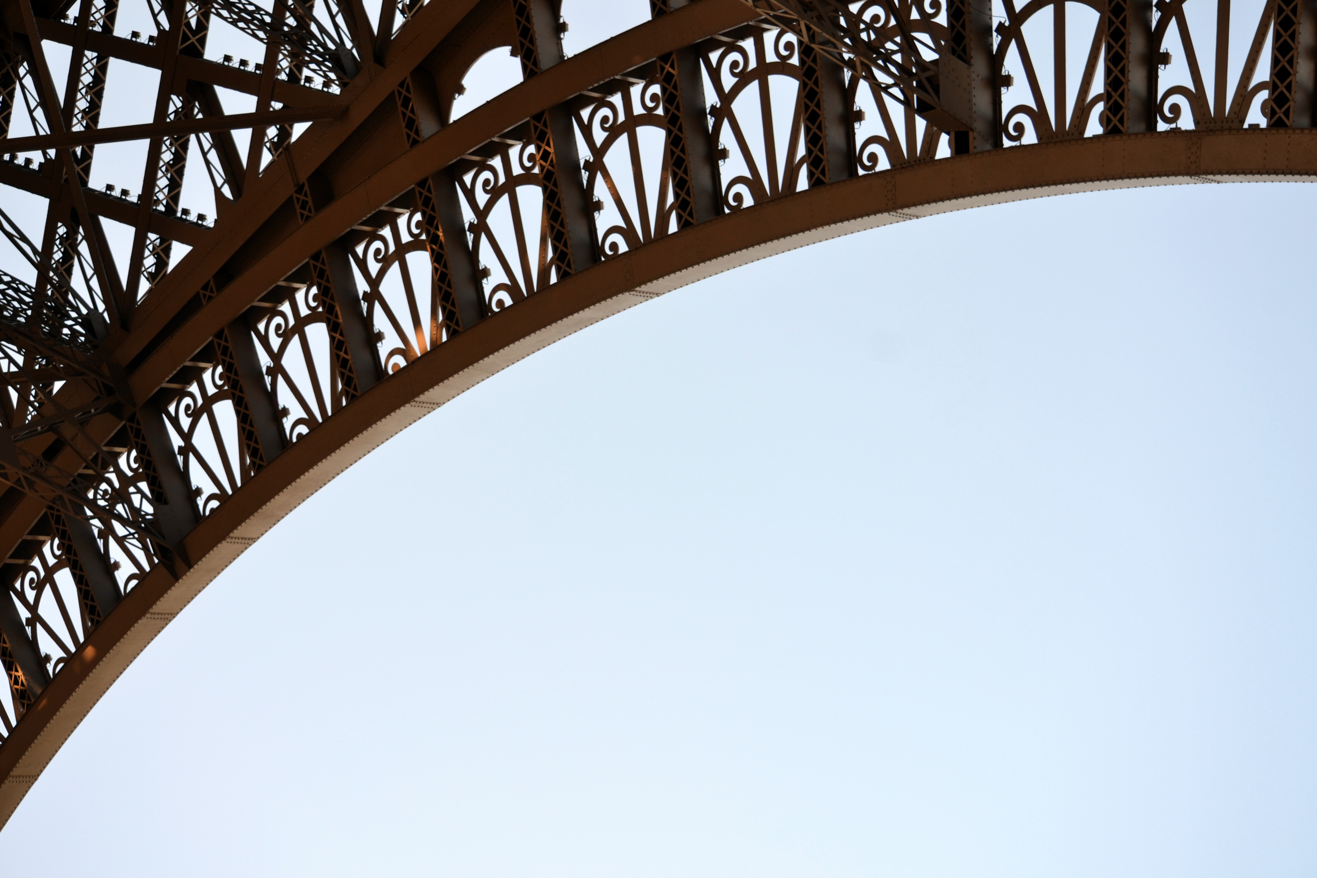 Deze foto is gemaakt tijdens een weekendje weg in Parijs (Frankrijk). This picture was taken during a weekend in Paris (France).